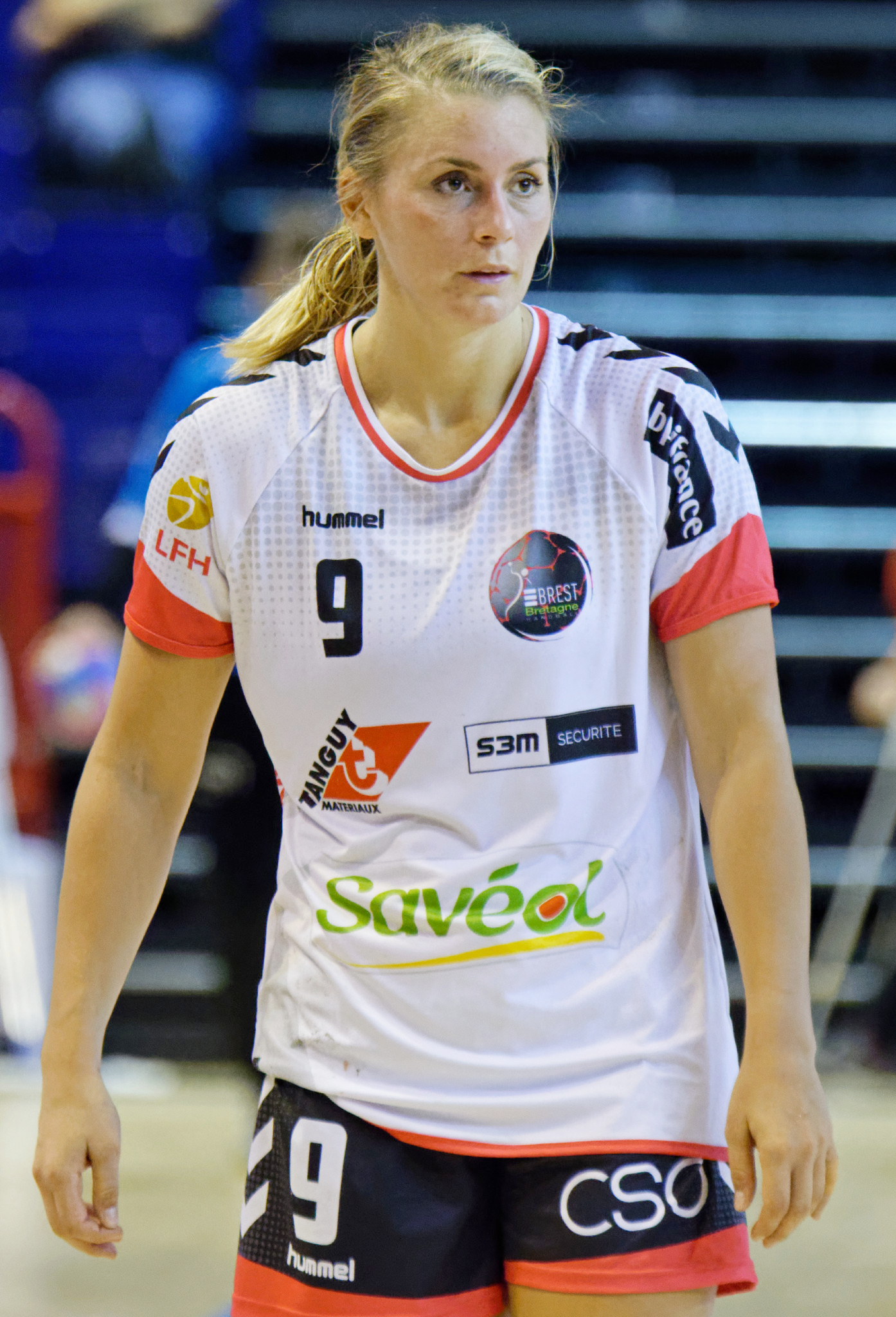 Rencontre de LFH entre Paris 92 et Brest Bretagne Handball. A la Halle Carpentier (Paris), le 05 septembre 2018.